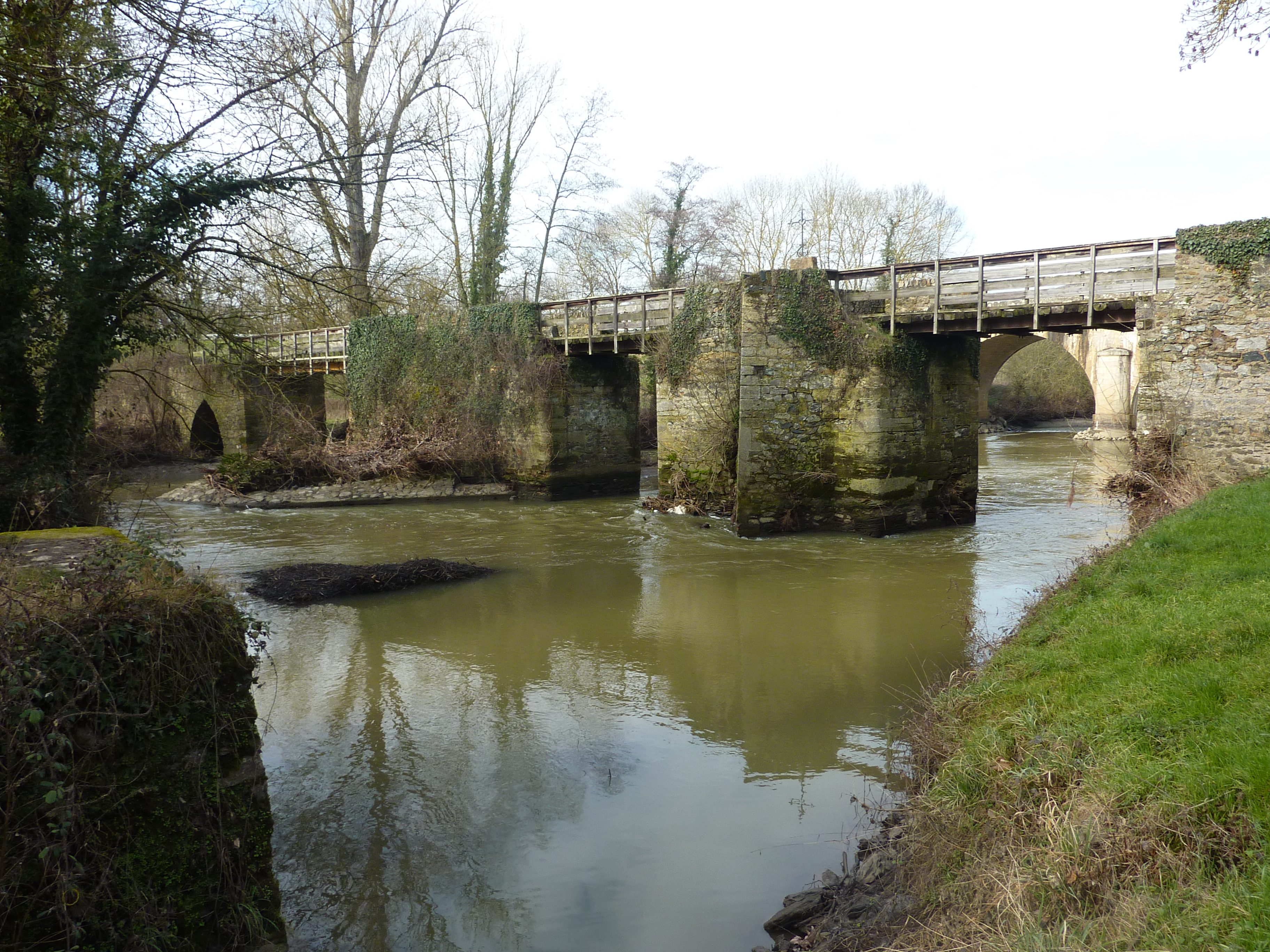 Vue d'ensemble du pont Barré de Beaulieu-sur-Layon (Maine-et-Loire, France).